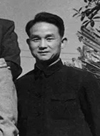 1954年9月第一届全国人大一次会议期间的徐肖冰